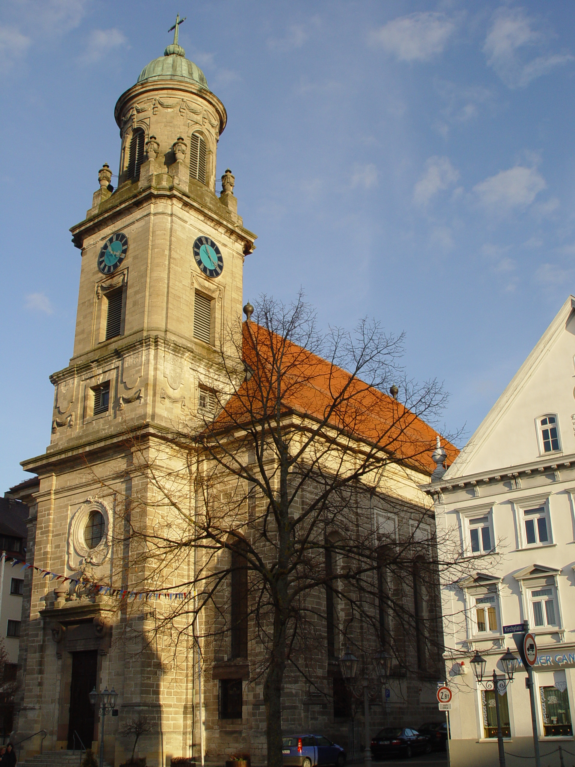 Katholische Kirche Stiftskirche St. Jacobus, Hechingen, Deutschland